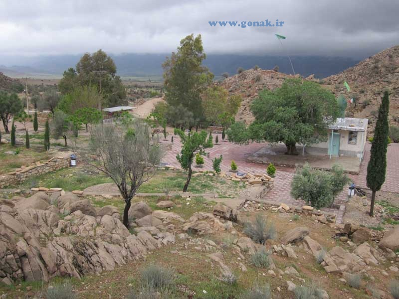 امامزاده شاه عطاالله از مکانهای دیدنی روستای گنک میمند فارس (gonak)